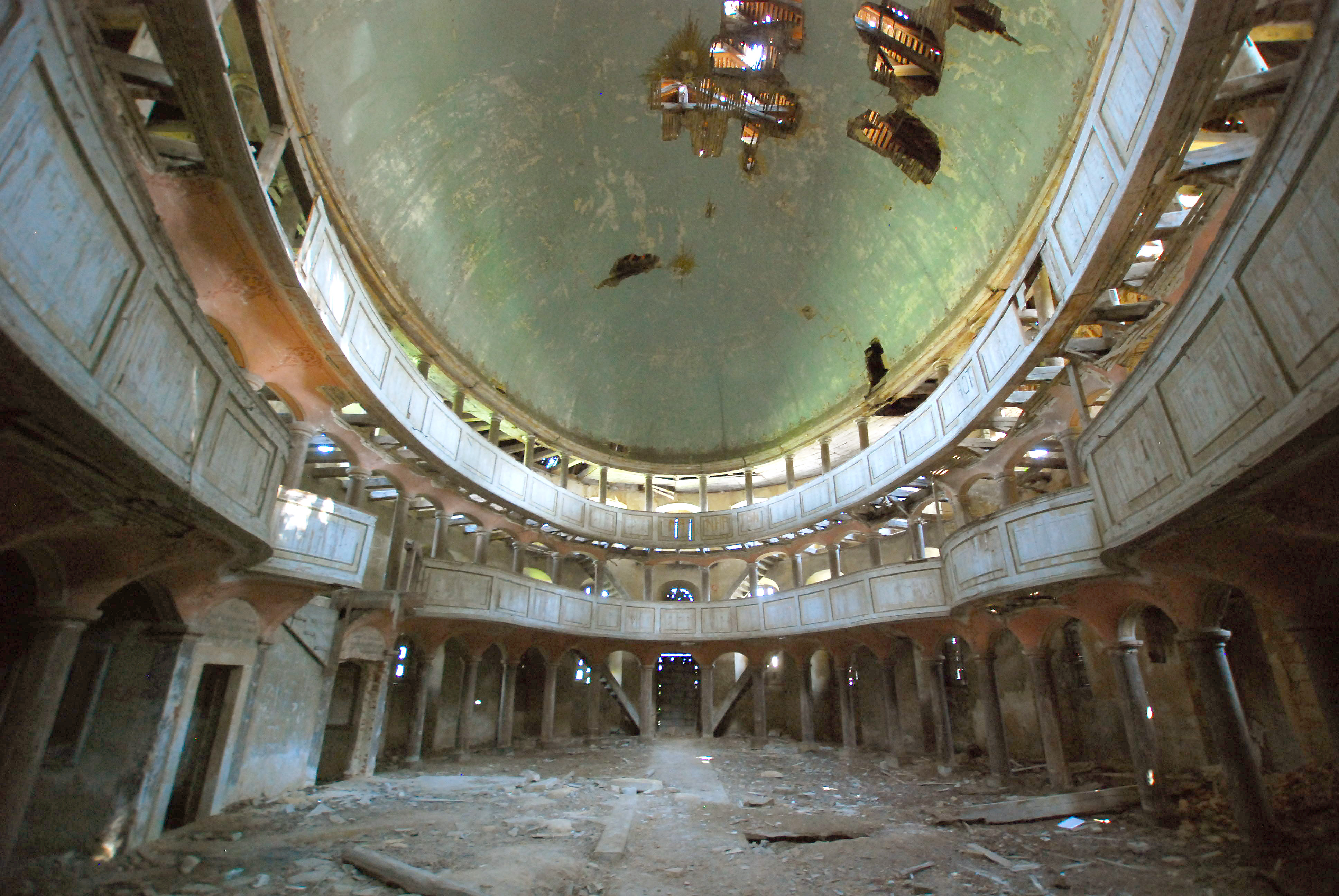 Żeliszów - kościół ewangelicki, 1796-1797, 1873-1877, projektu Carla Gottarda Langhansa, twórcy m.in. Bramy Brandenburskiej. Po wojnie porzucony, obecnie w ruinie.